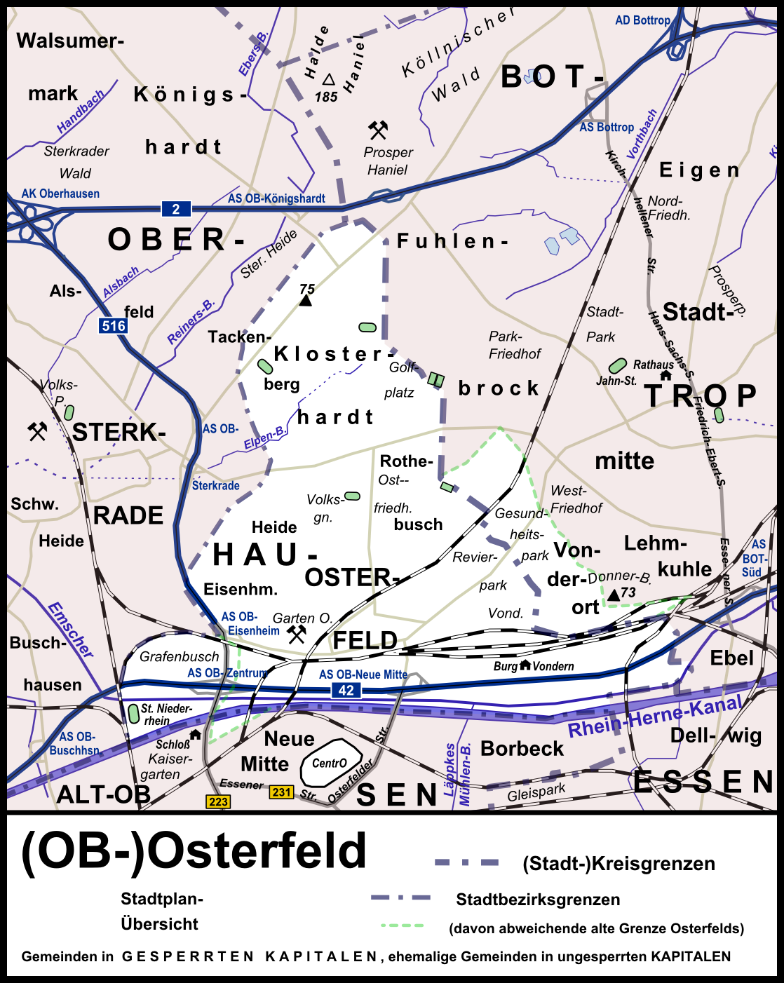 Stadtplanübersicht (Oberhausen-)Osterfelds